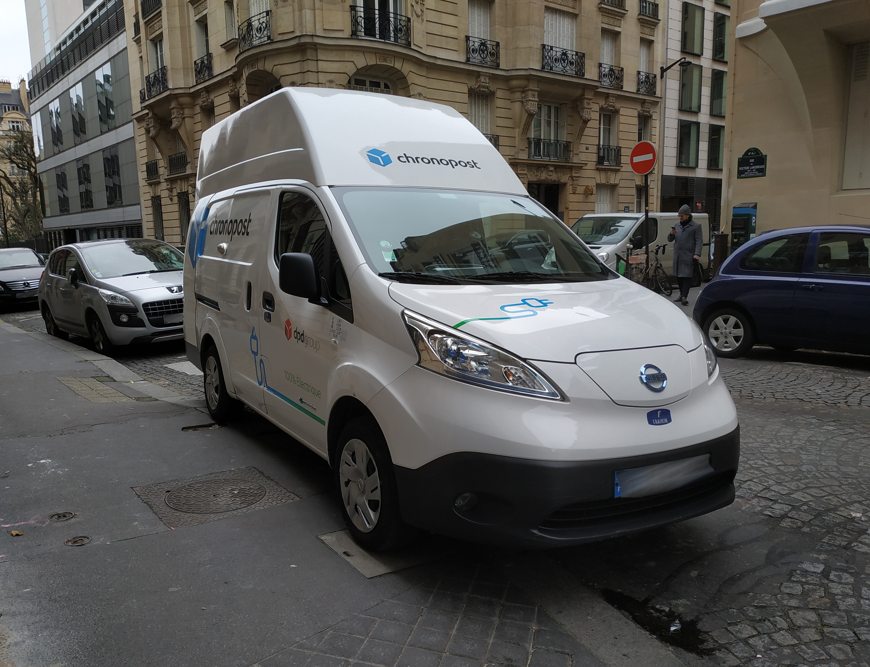 Nissan e-NV200 de Chronopost (DPD group) à Paris